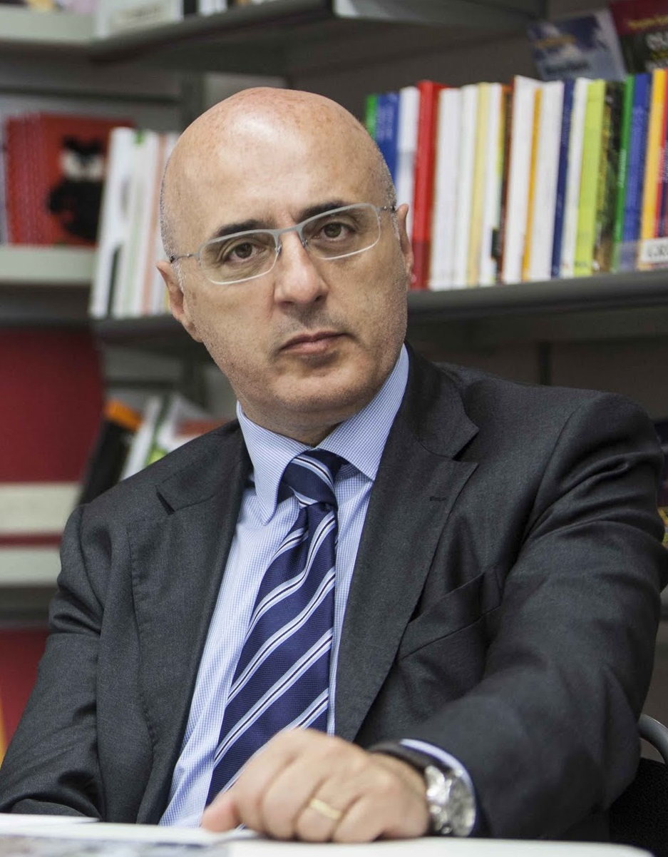 direttore editoriale Finegil, Gruppo L'Espresso